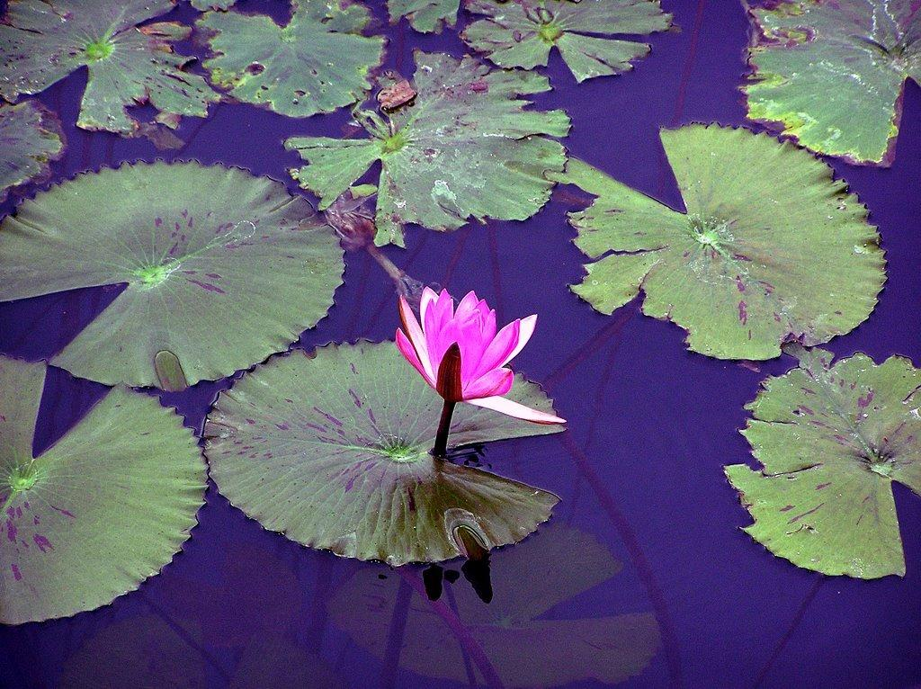 Hévizi tavirózsa